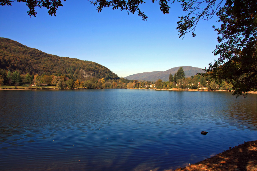 Il lago di Ghirla nel comune di Valganna